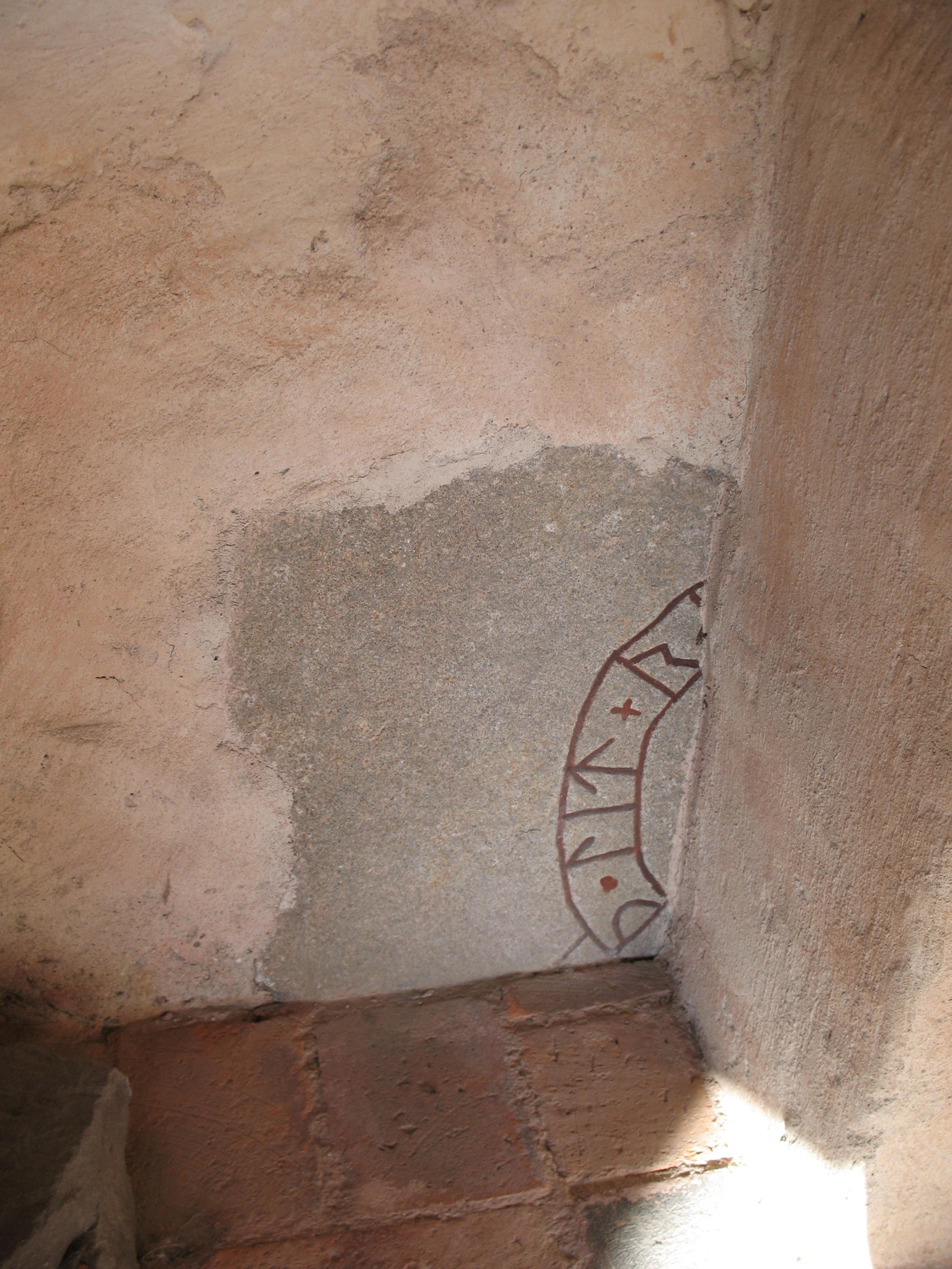 a runestone